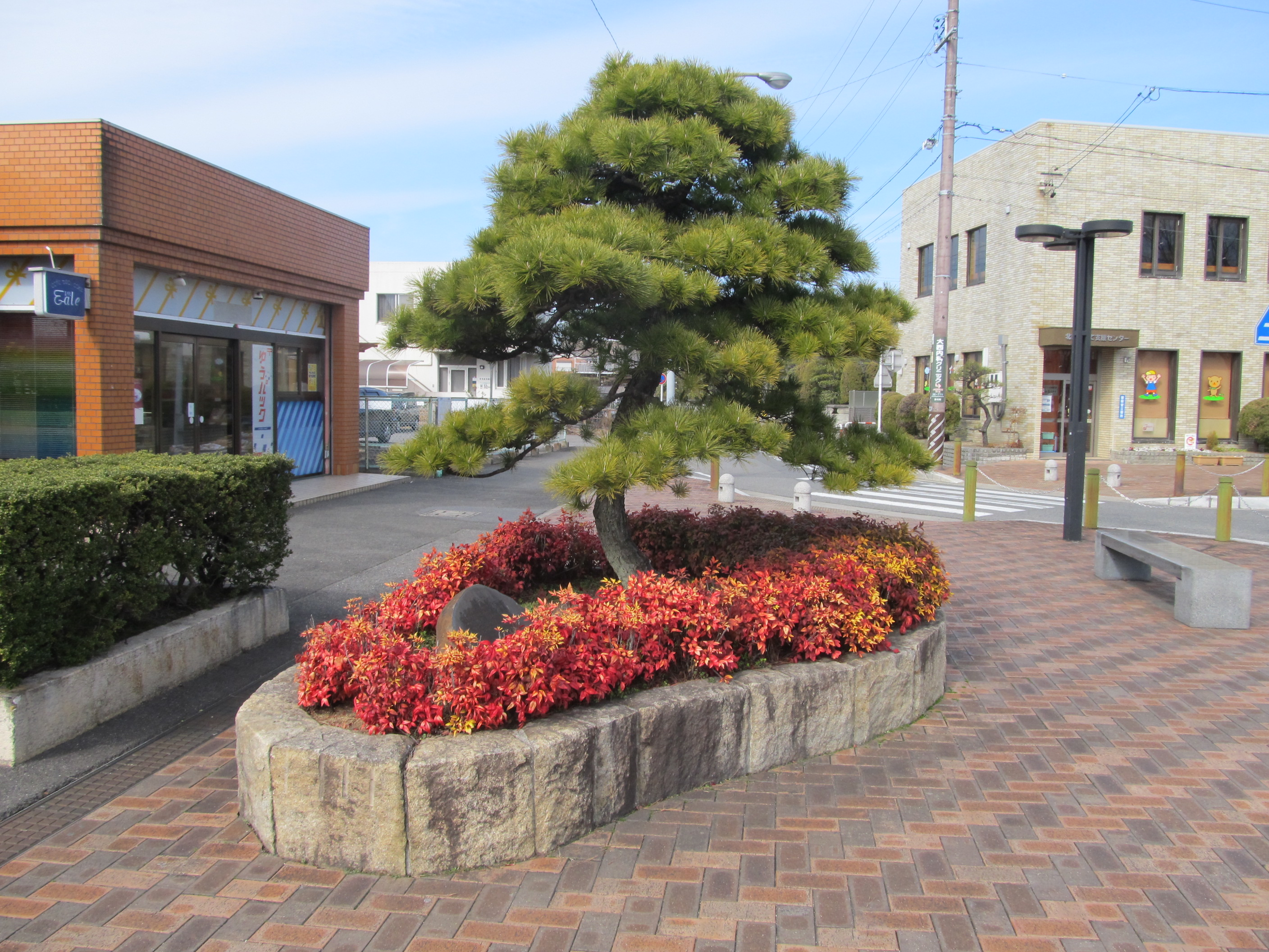 富士松駅前に植えられている「お富士の松（三代目）」